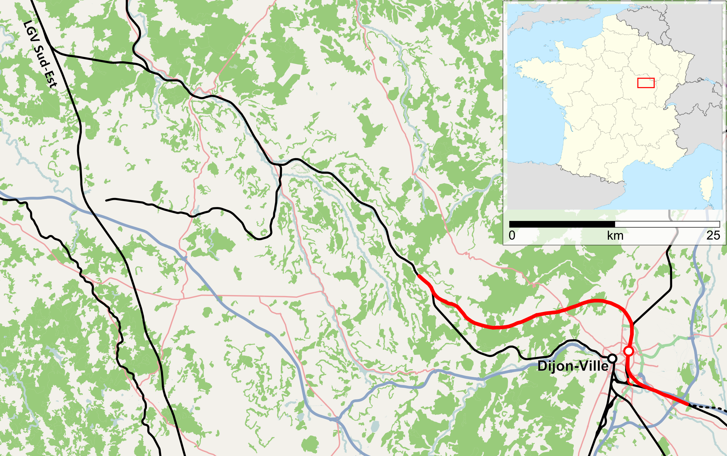 Verlauf des Westastes der LGV Rhin-Rhône